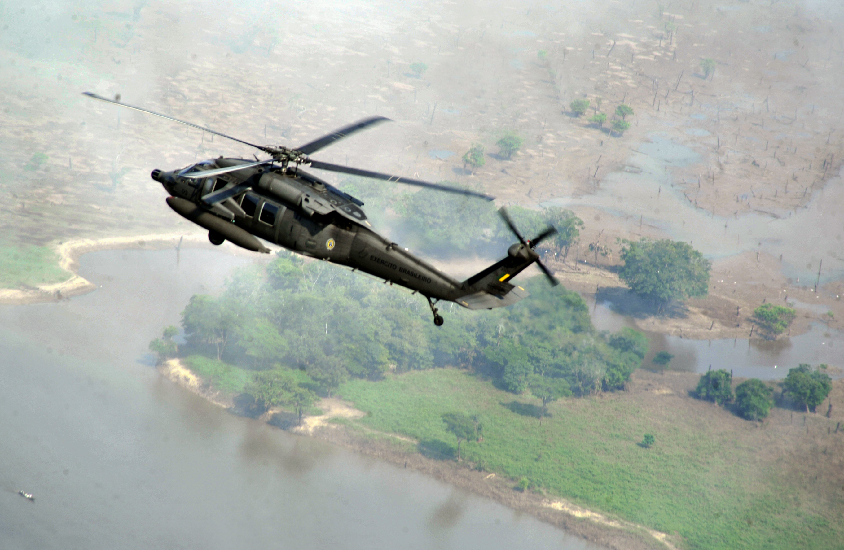 Helicóptero sobrevoa o rio Purus, em Paricatuba (AM), onde ocorreu a Operação Amazônia 2012, 26/09/2012 Foto: Tereza Sobreira